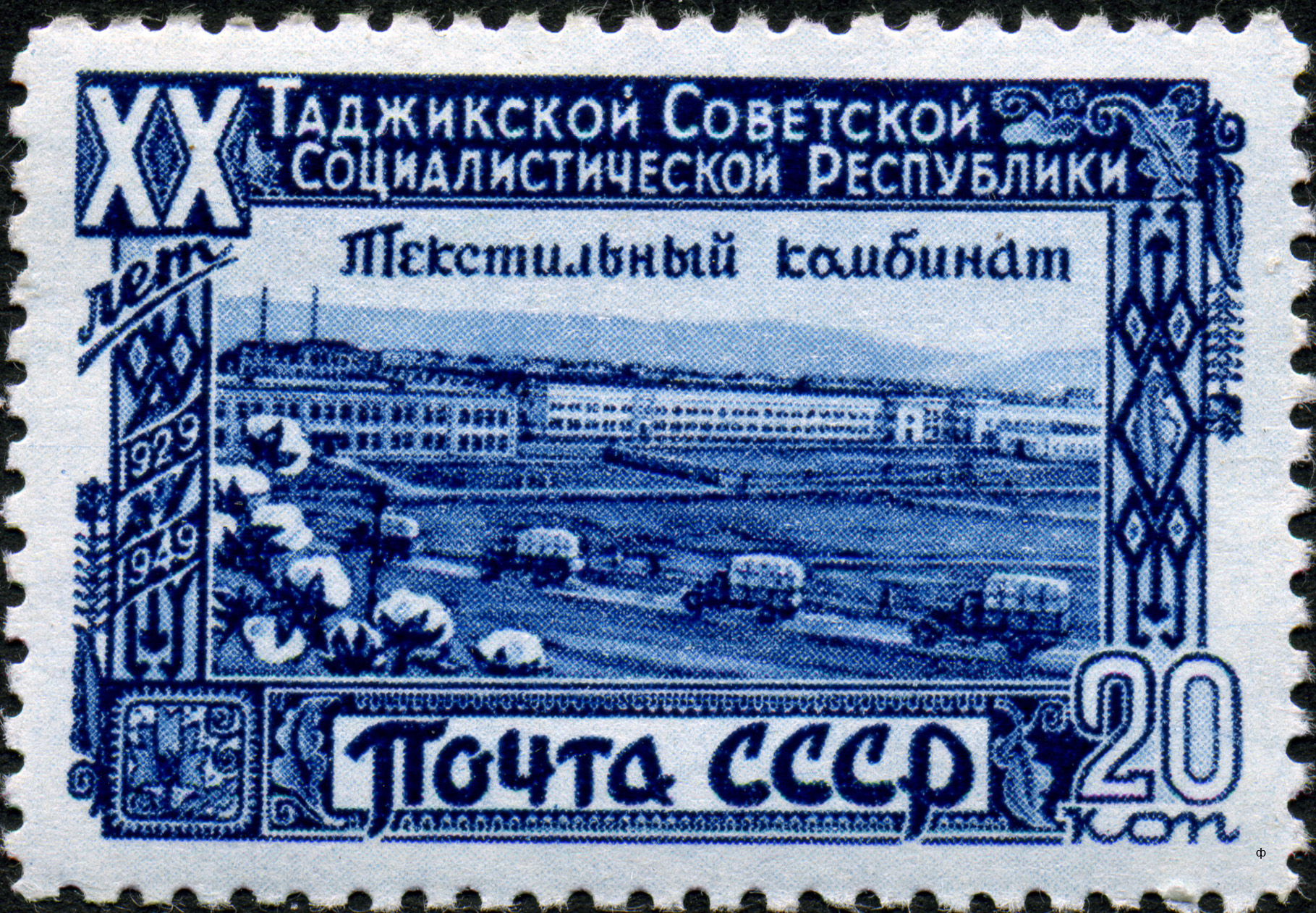 Марка СССР